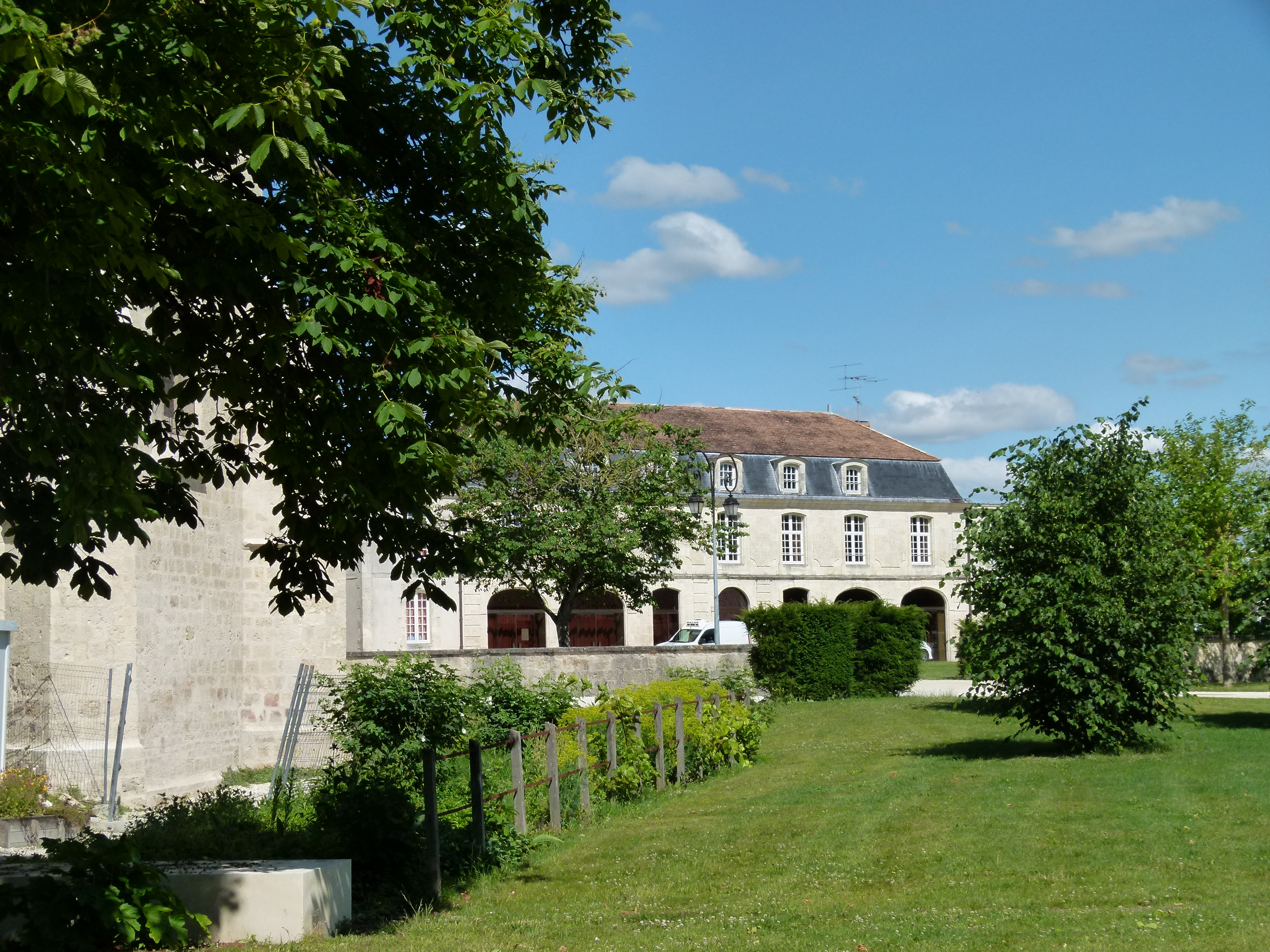 L'ancienne Demeure du Régisseur du Château de Surgères date du début du XVIIIe siècle.